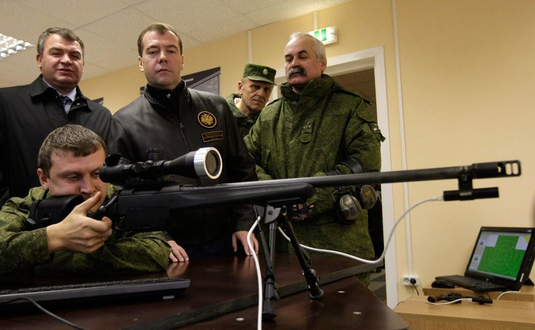 Steyr SSG 04